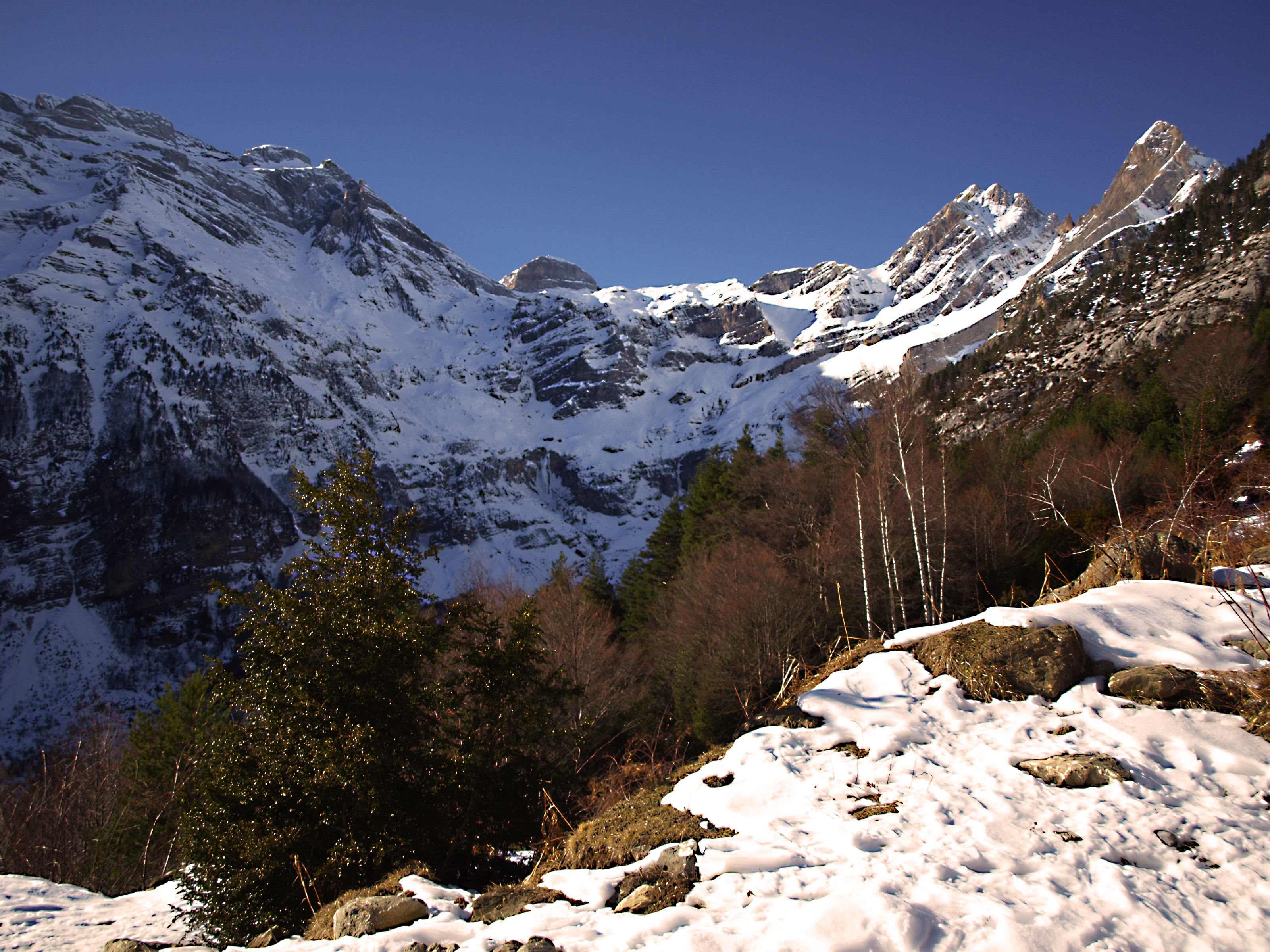 Río Cinca (Valle de Pineta) This is a photography of a Special Area of Conservation in Spain with the ID: ES2410019. Natura2000 entry, EEA entry